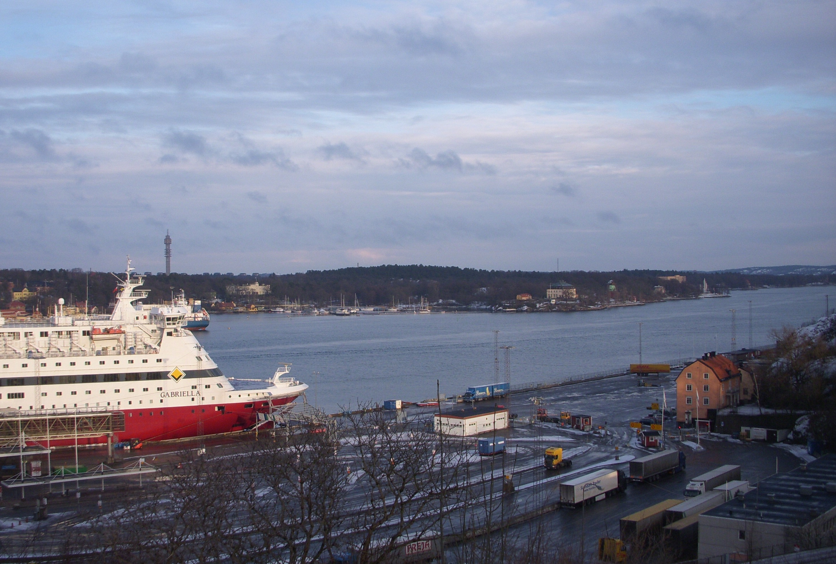 Saltsjön, Stockholms hamninfart från Åsöberget